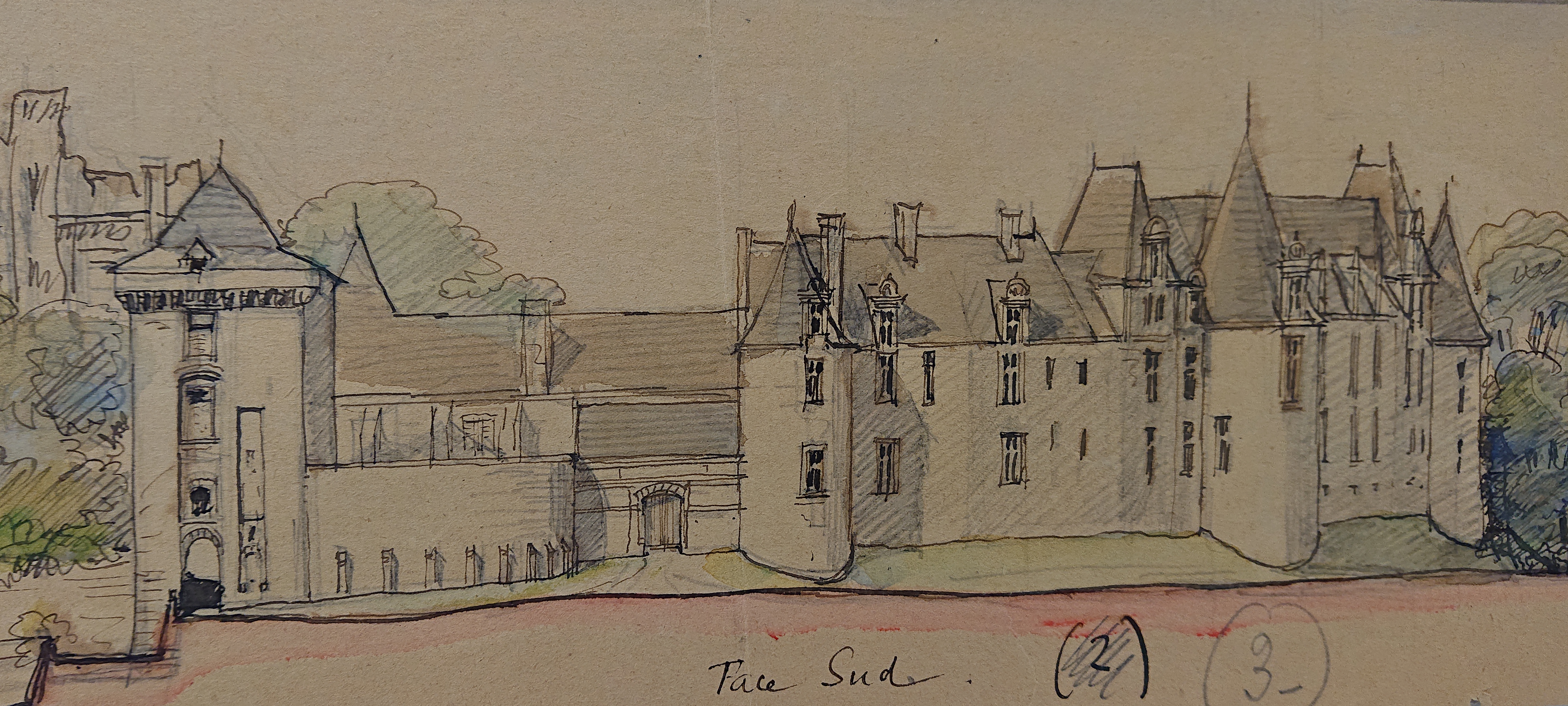 Face sud du Château de Châteaubriant, par Henri Deverin.